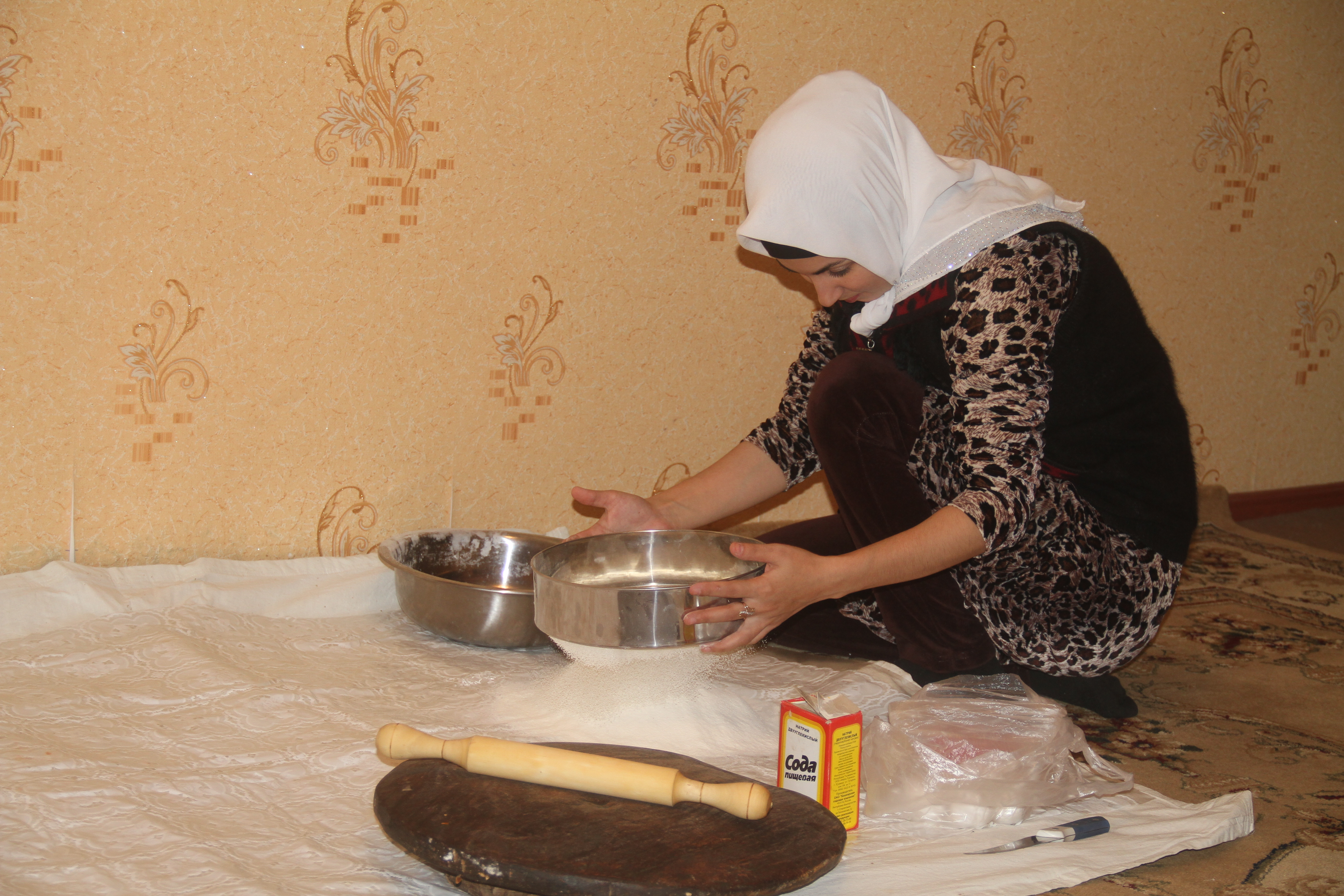 Тоҷикӣ: Чак-чак (1)